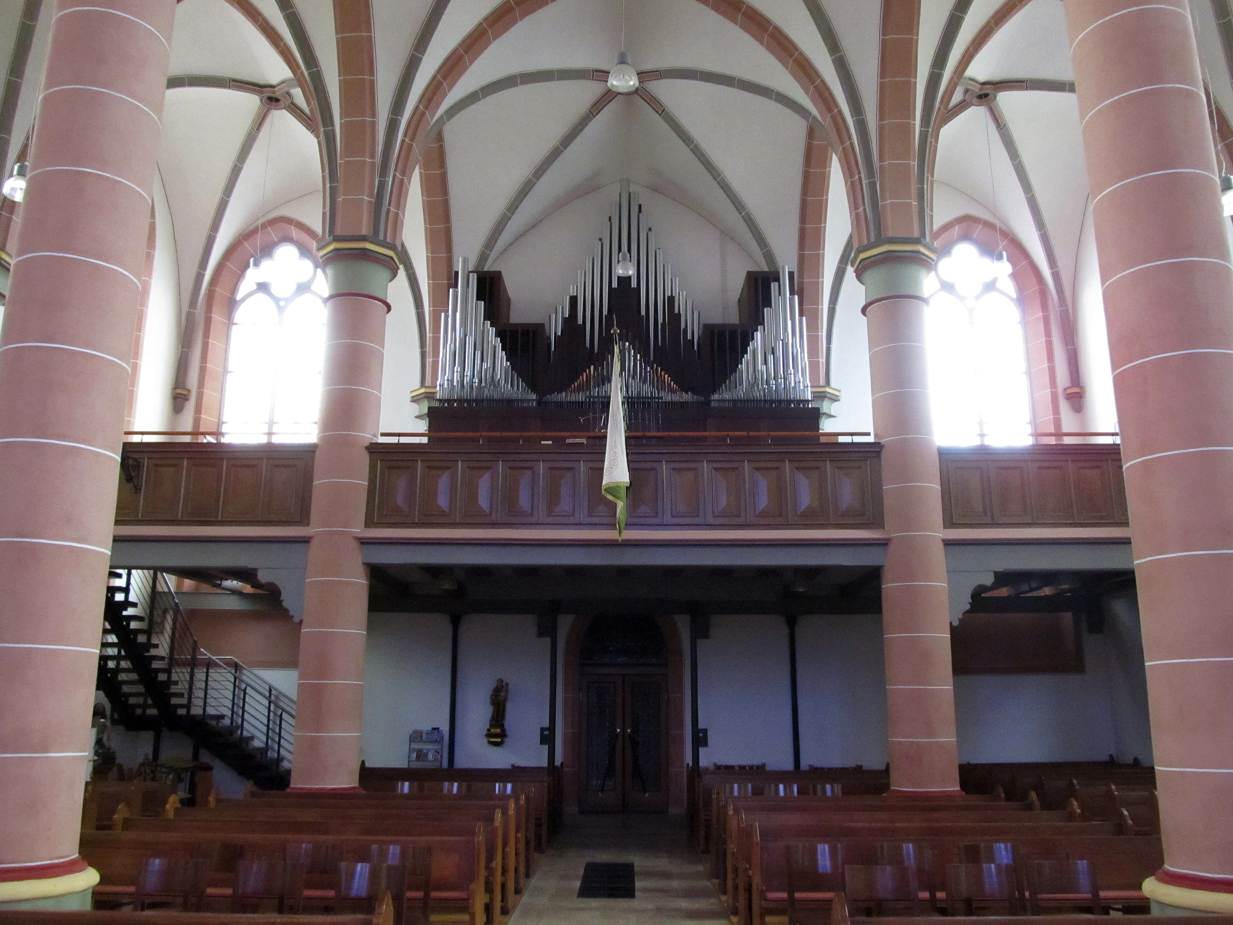 Blick ins Innere der katholischen Pfarrkirche St. Martin in Schiffweiler, Landkreis Neunkirchen, Saarland